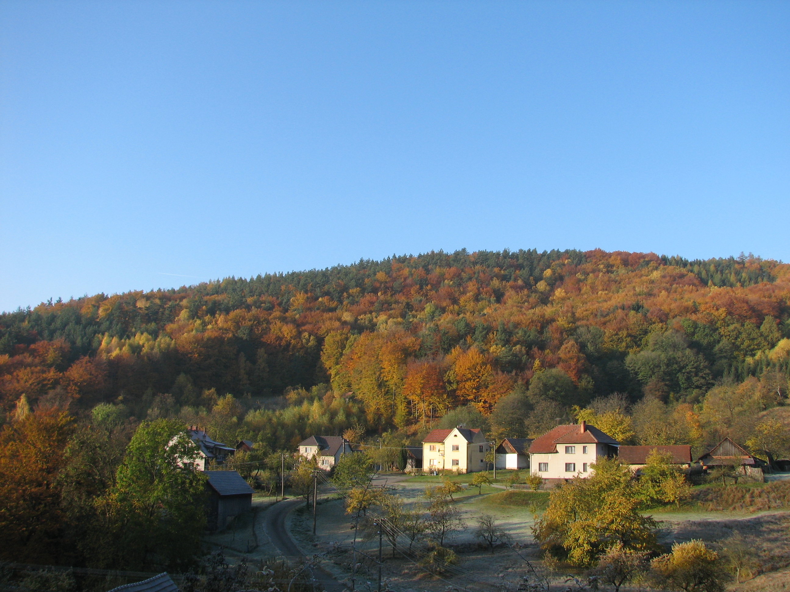 Pohled na obec Pradlisko